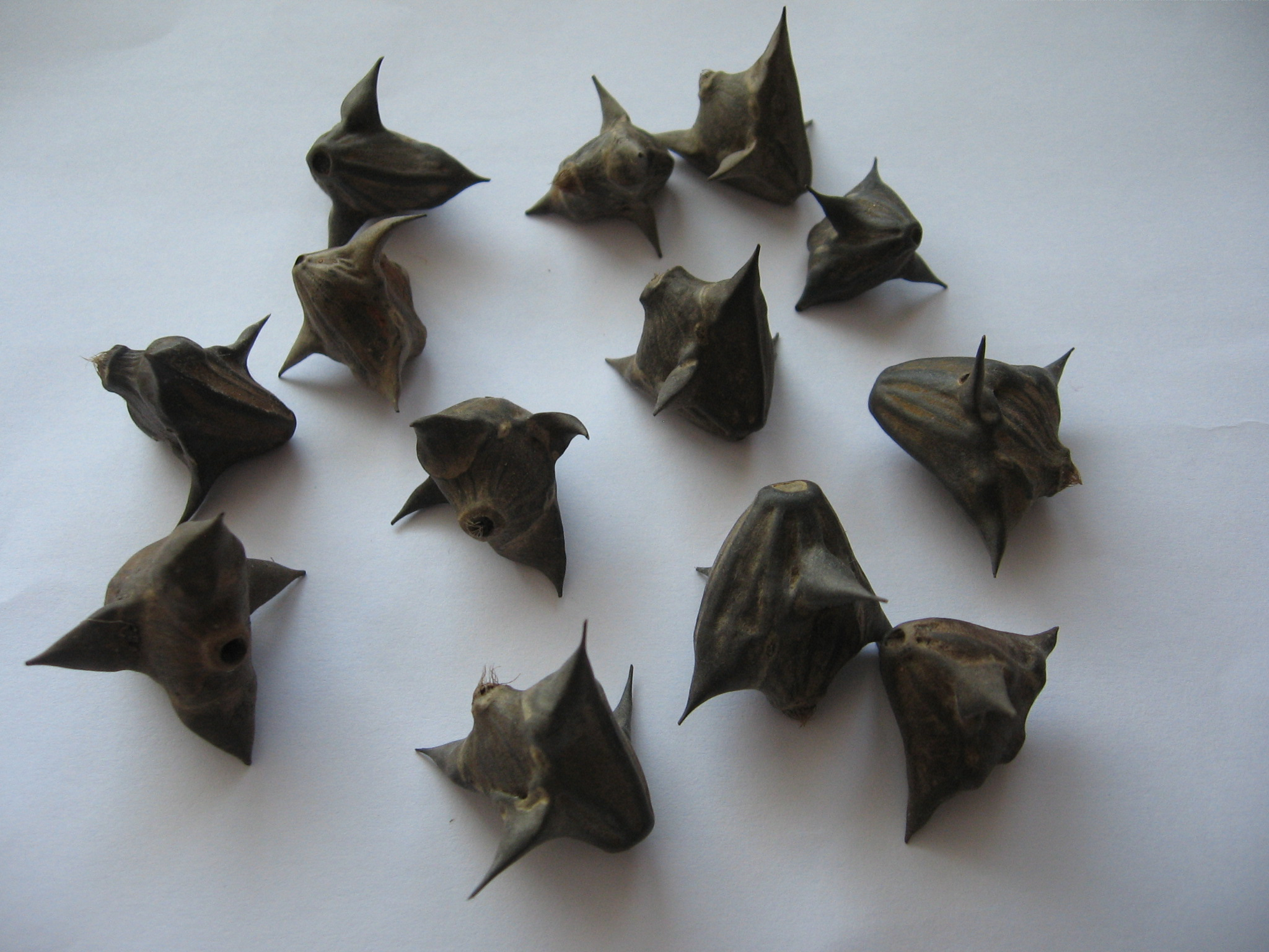 Plod kotvice plovoucí (Trapa natans) - dříve používaný jako potravina či krmivo pro prasata